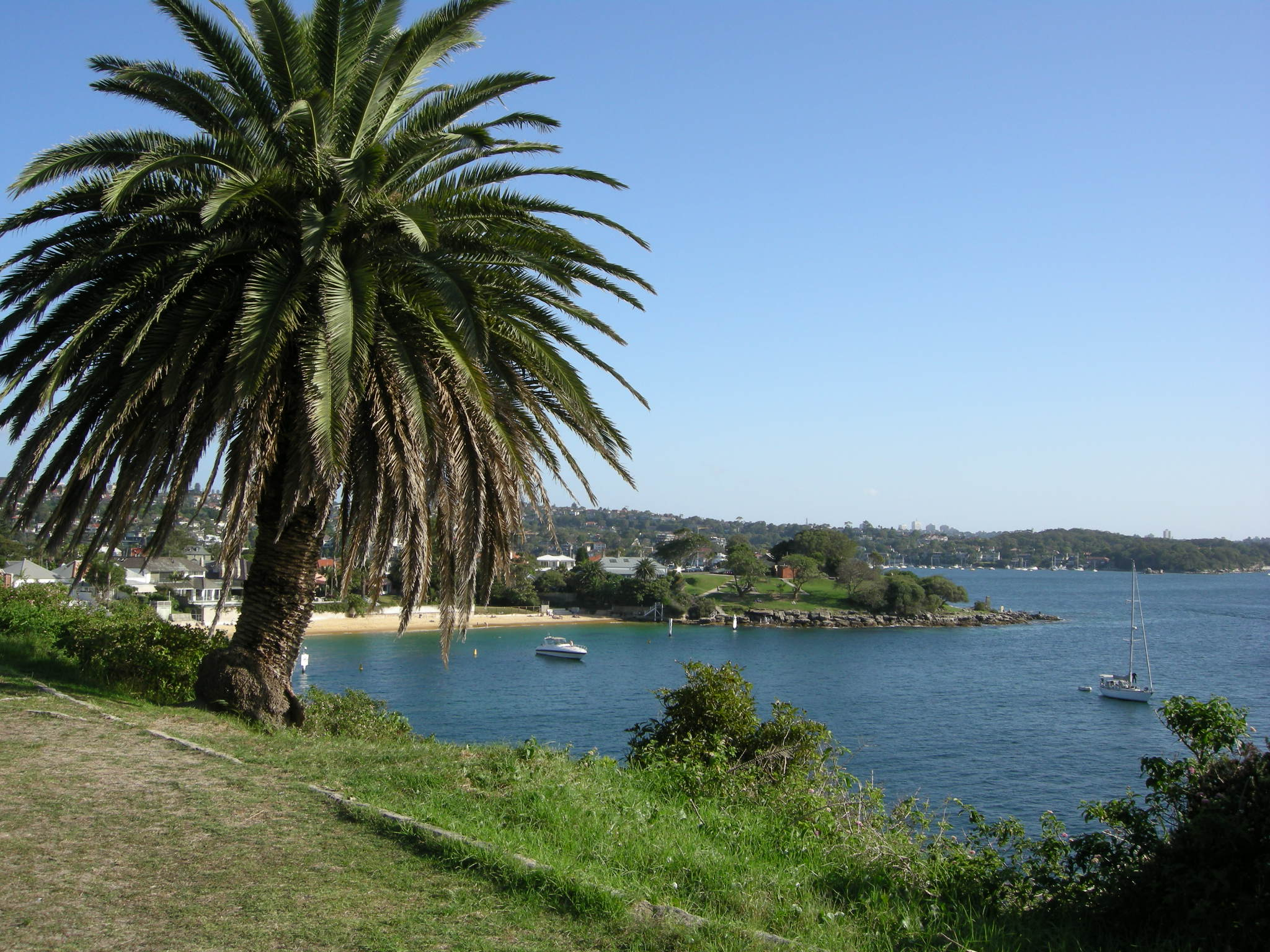 Watson bay